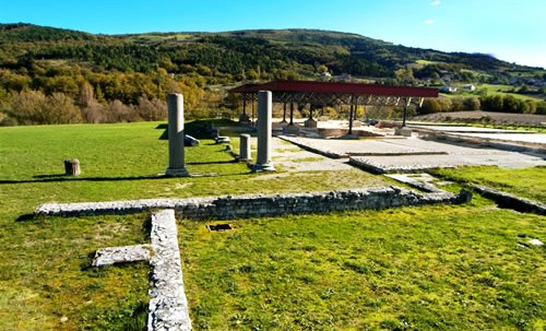 Area archeologica di Sentinum